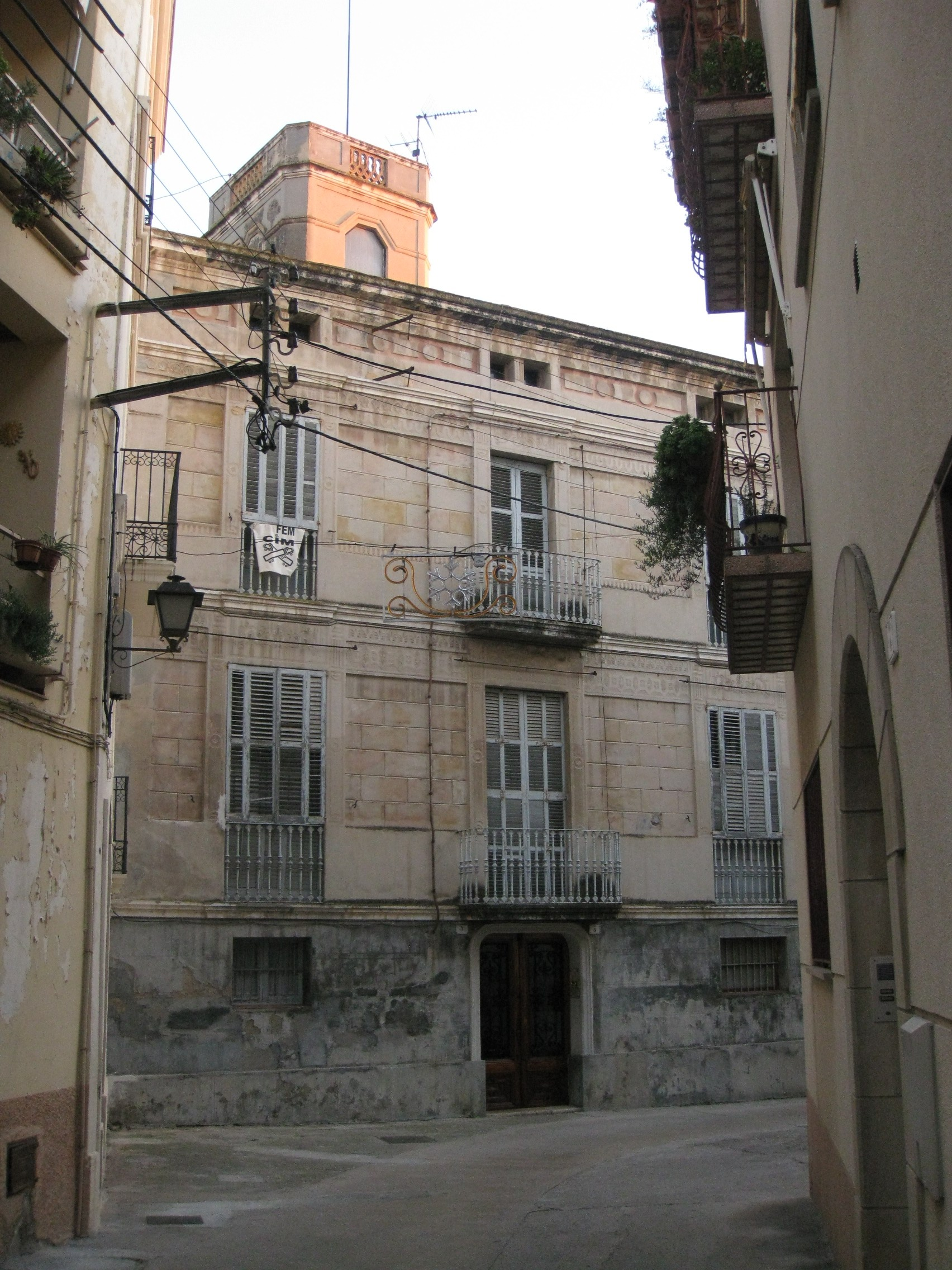 Casa al carrer Jussà, 5 (l'Arboç)